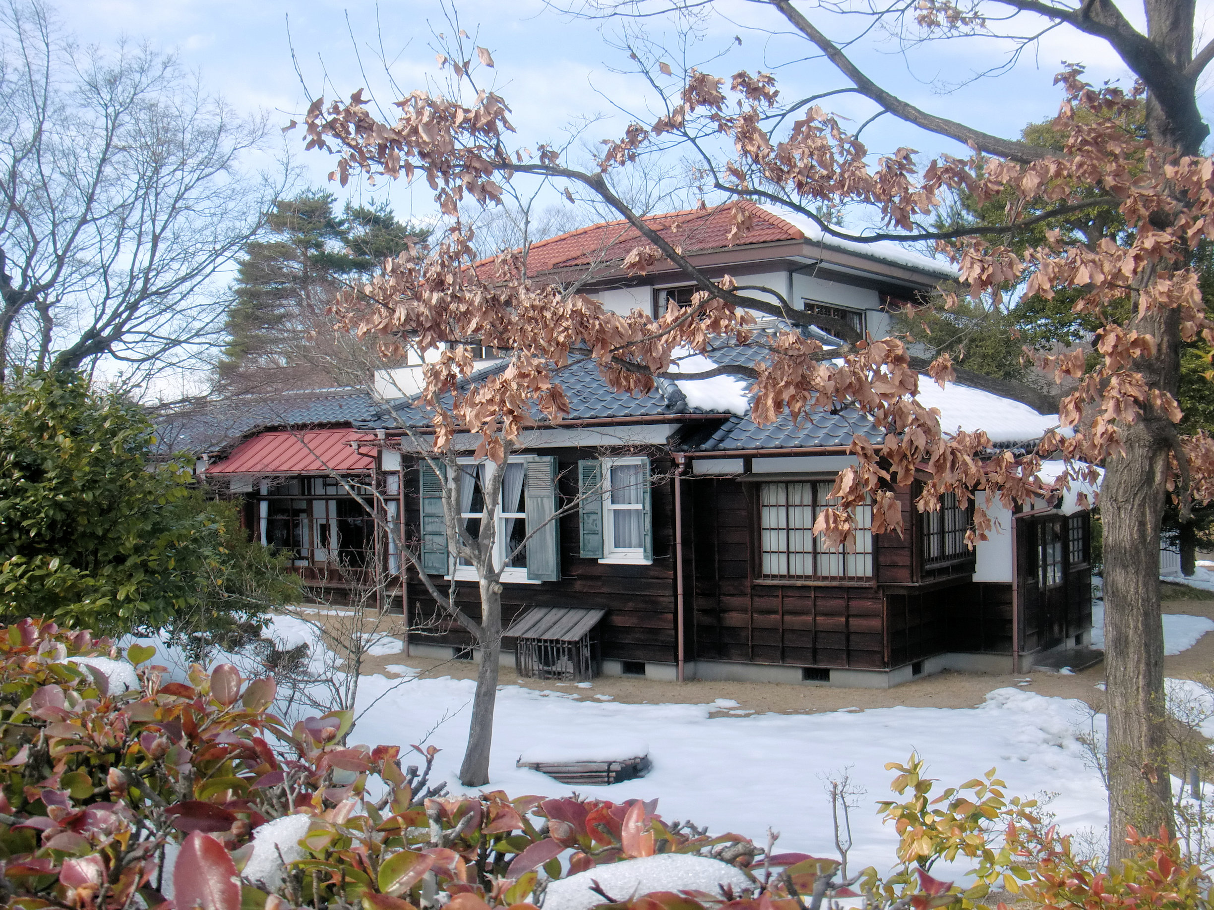 郡山市の久米正雄記念館 道路側から